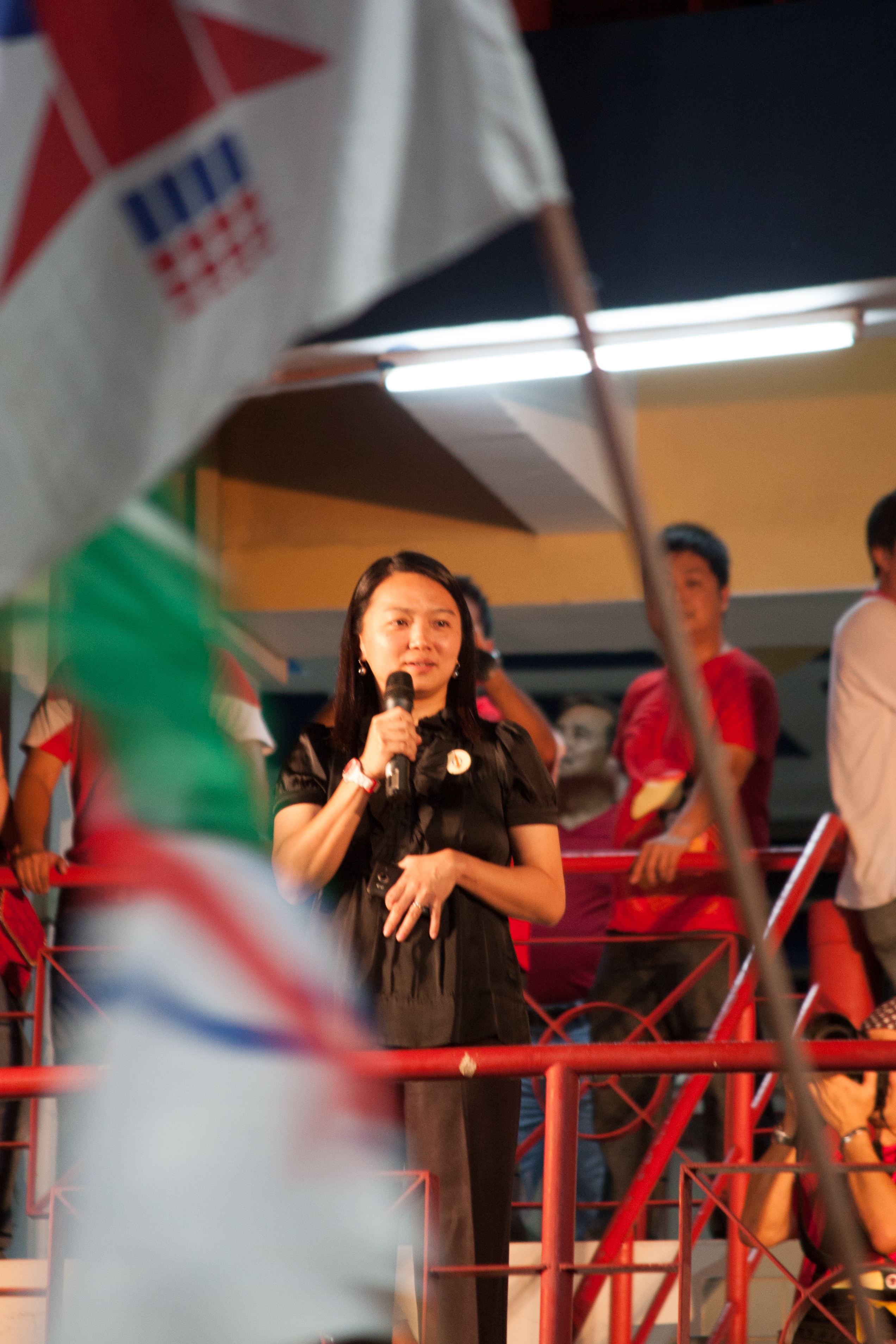 Hannah Yeoh dalam satu ceramah mewakili DAP 粵語: 馬來西亞政治人楊巧雙